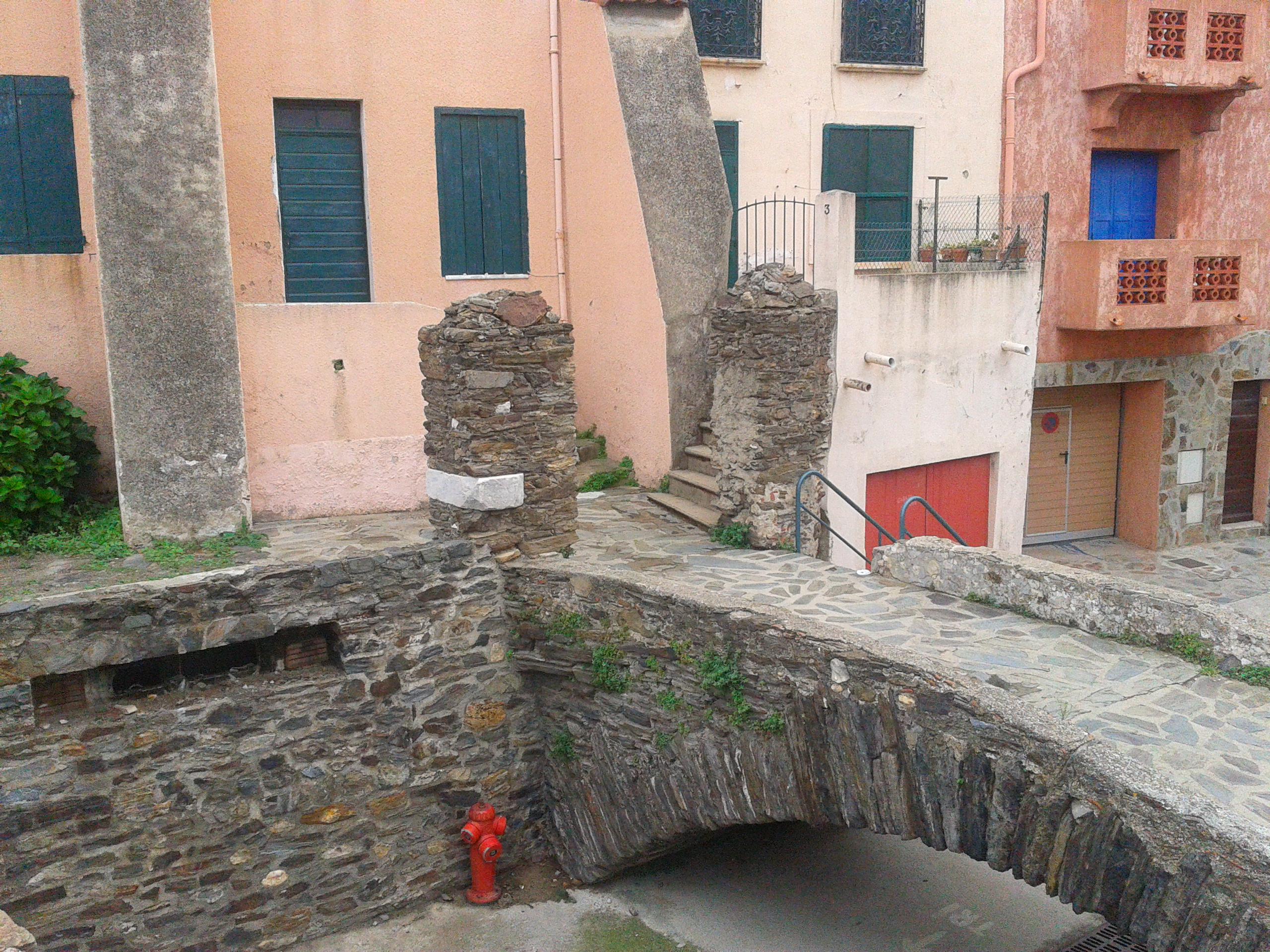 Couvent des dominicains de Collioure, blocs de marbres provenant du couvent en réemploi dans des constructions à son emplacement .